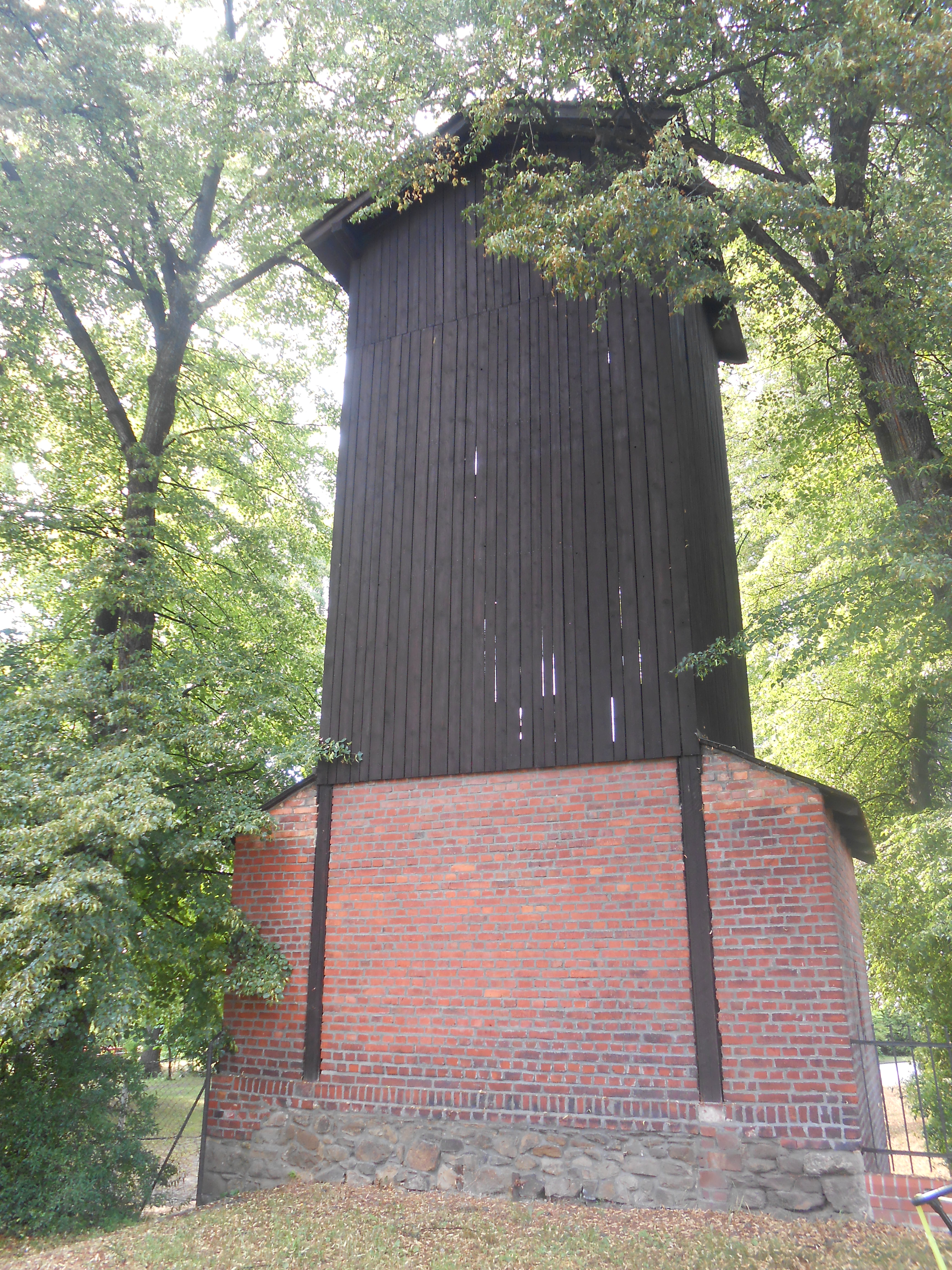 Hlučín, hasičská zbrojnice-sušárna hadic